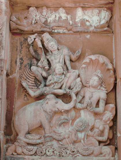 Deogarh, Dasavatara-Tempel, Vishnu + Elefant; 500-550 CE; Source: The Iconography of the Viṣṇu Temple at Deogarh and the Viṣṇudharmottarapurāṇa